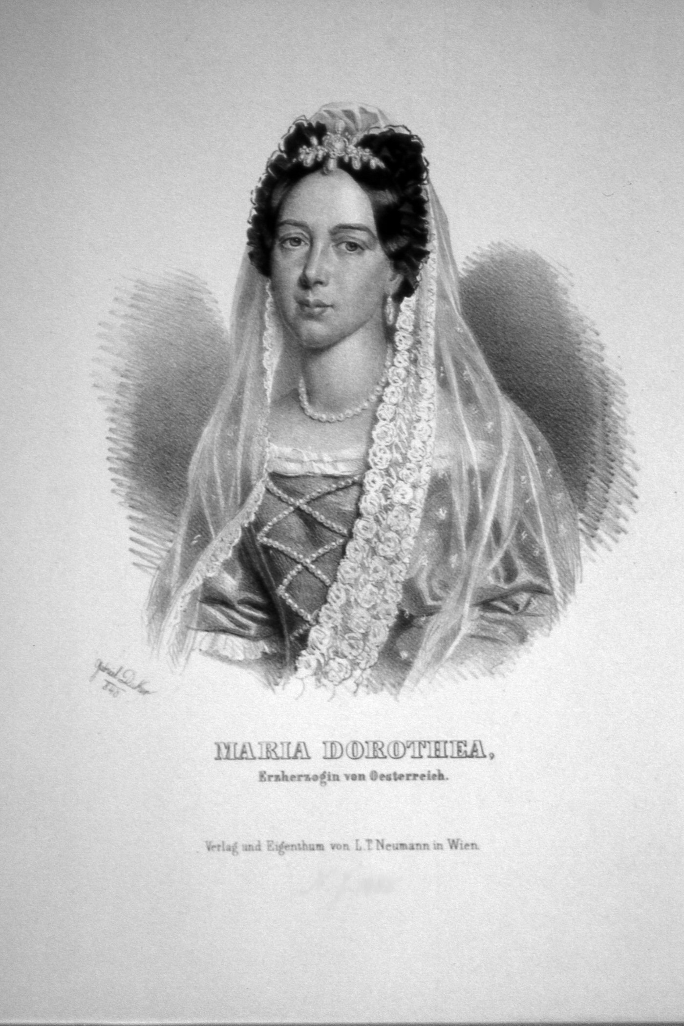 Maria Dorothea Prinzessin von Württemberg (1797-1855), Erzherzogin, Ehefrau von Erzherzog Joseph, Palatin von Ungarn.